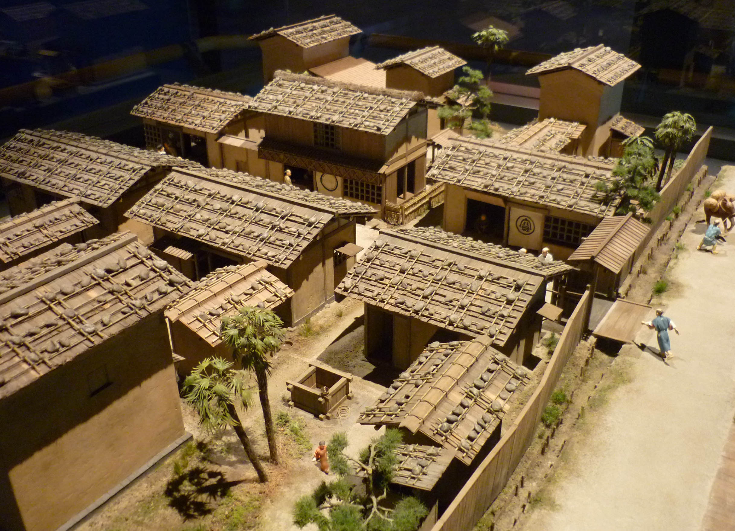 大坂本願寺復元模型